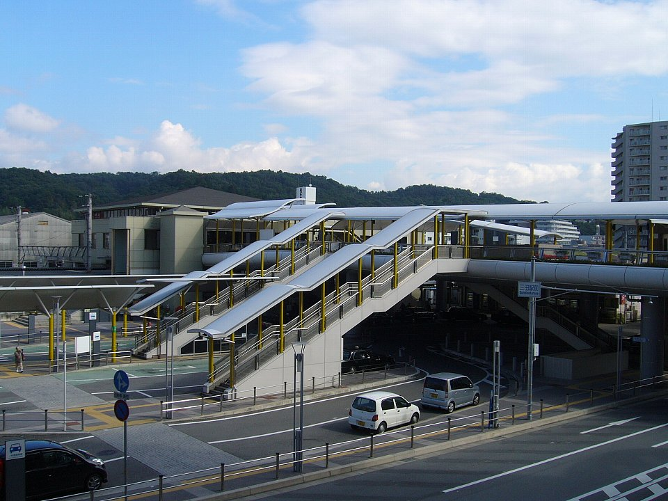 福知山線三田駅 西口